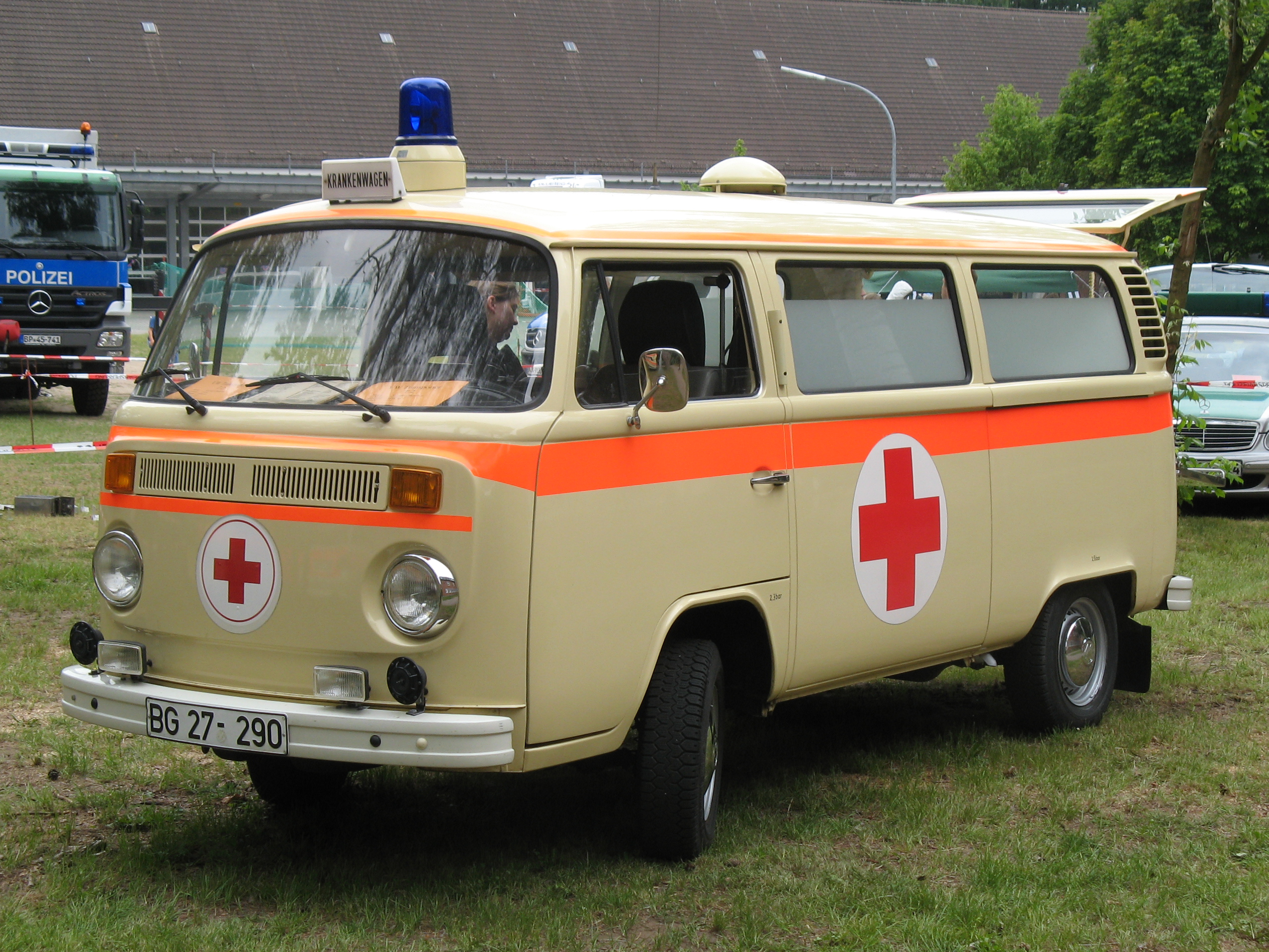 Krankenwagen des Bundesgrenzschutzes. Ausgestellt am Tag der offenen Tür der Bundespolizei (ehemals Bundesgrenzschutz) anlässlich des 60-jährigen Jubiläums.